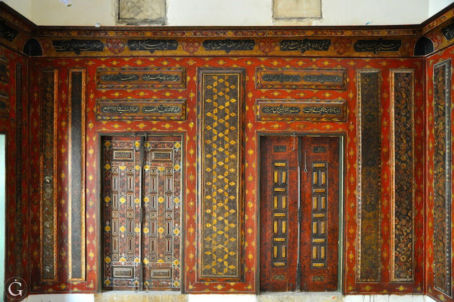 Panneaux de boiseries de la qoubba (pièce 16) jouxtant l'Iwan de la maison Ghazaleh à Alep